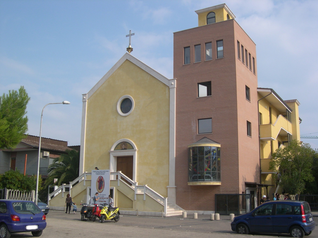 Chiesa di San Giovanni Bosco a Montesilvano